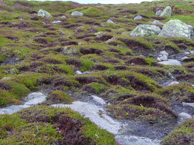 lande littorale exposée, pointe du Raz, Bretagne, France